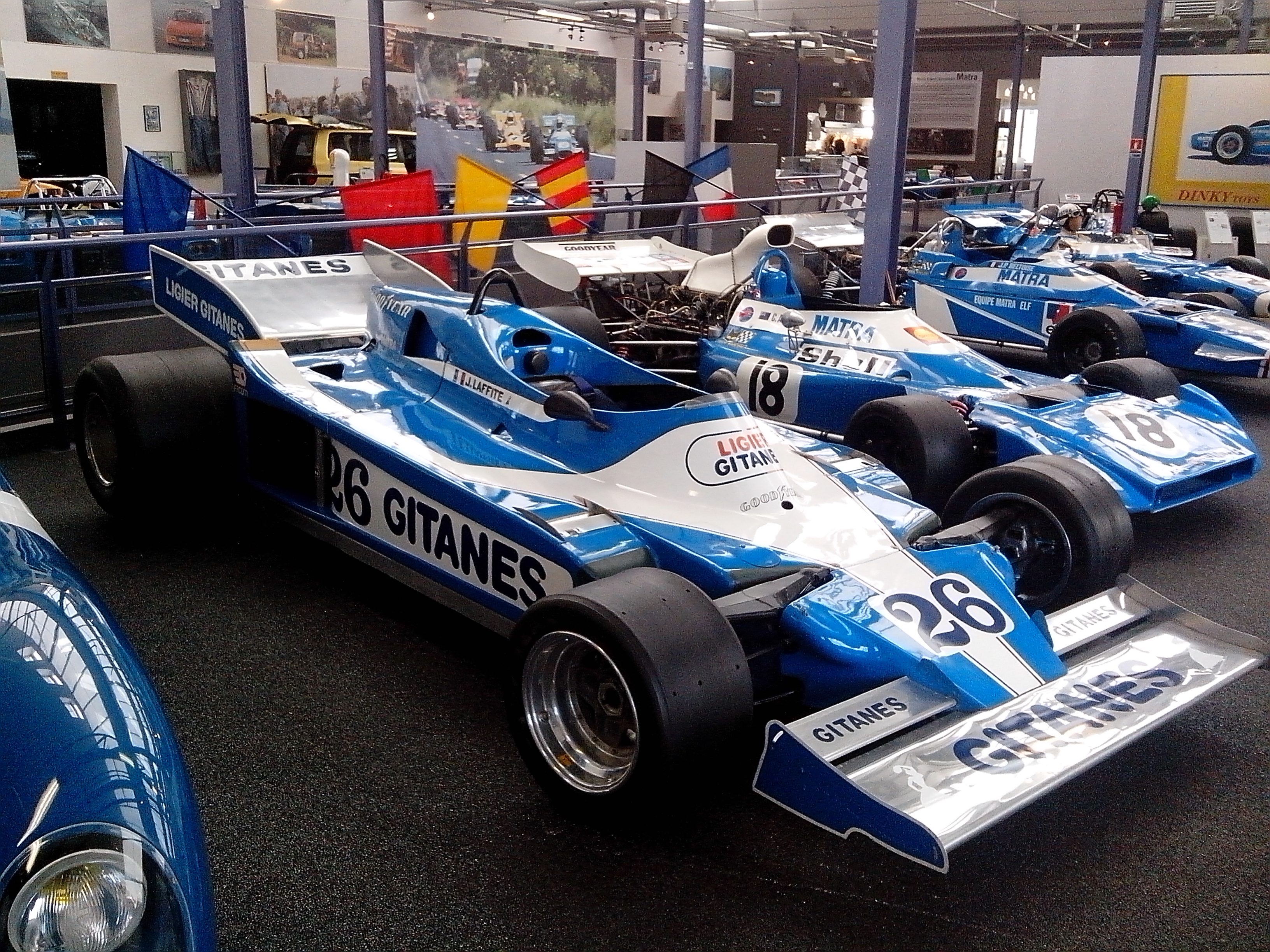 Collection de l'Espace Automobiles Matra